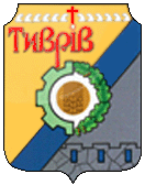 Герб Тиврівського району Вінницької області